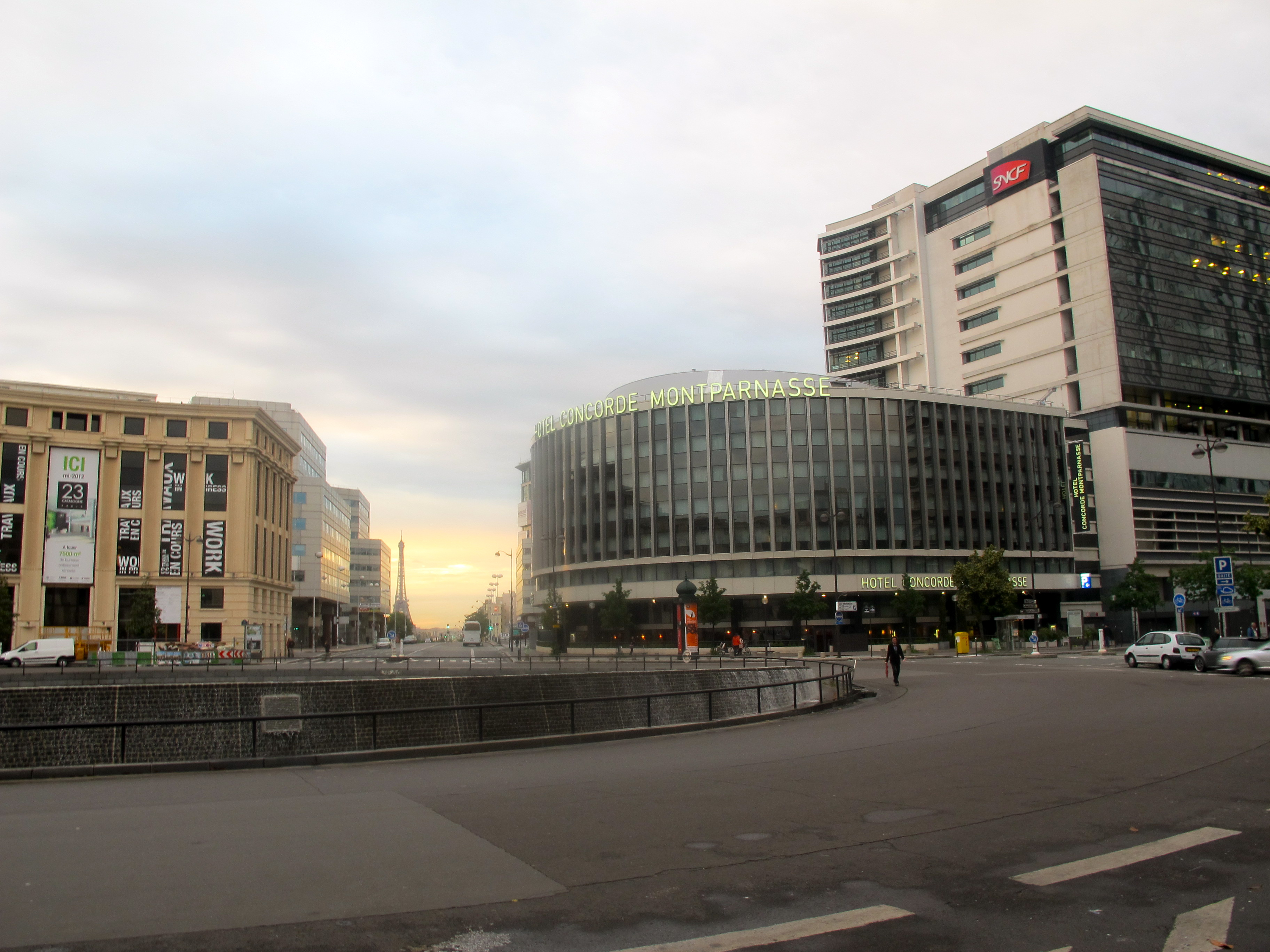 Vue de l'hôtel Concorde-Montparnasse, Place de Catalogne, XIVe arrondissement, Paris, France.